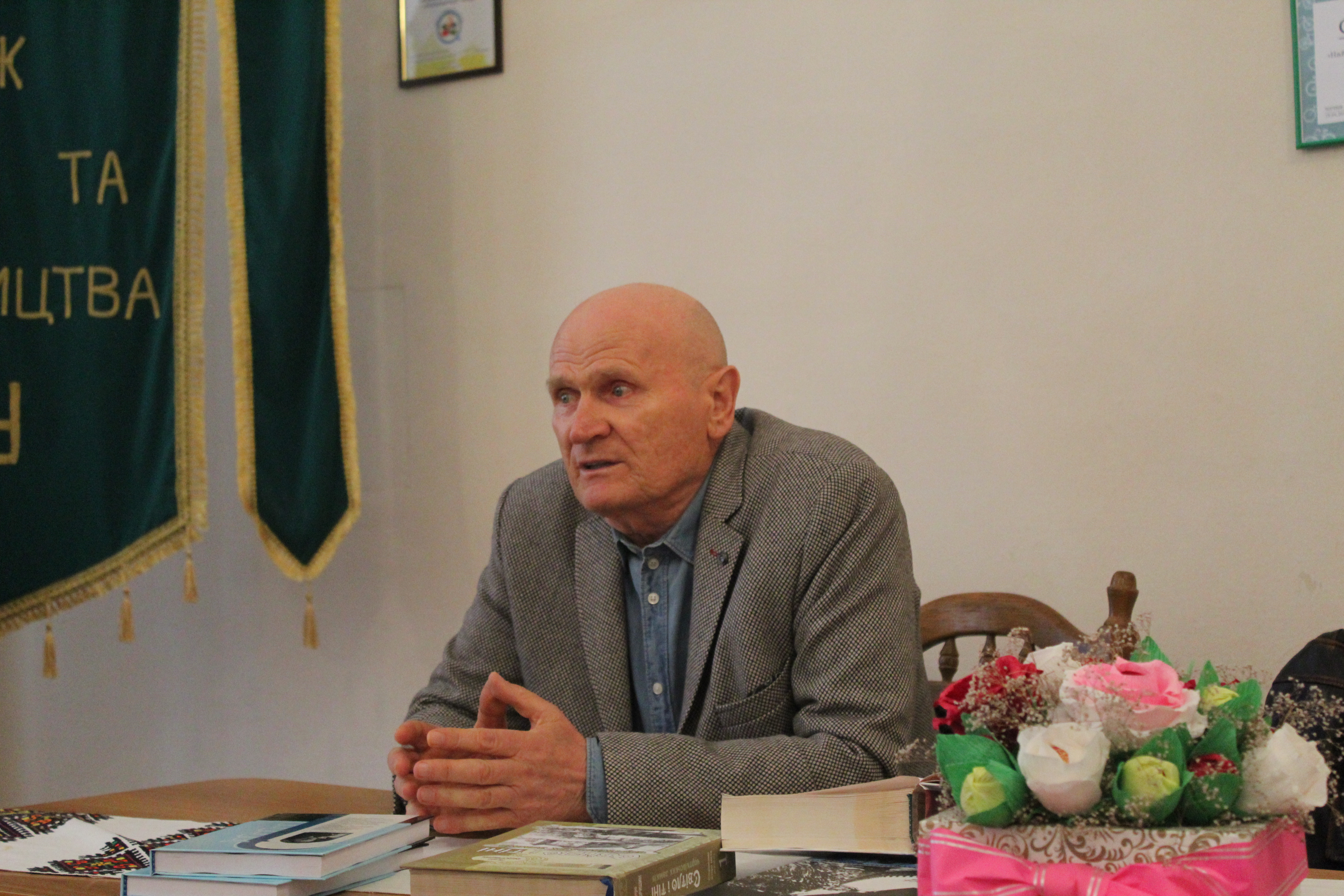 Петро Федоришин у Чортківському коледжі економіки та підприємництва ТНЕУ